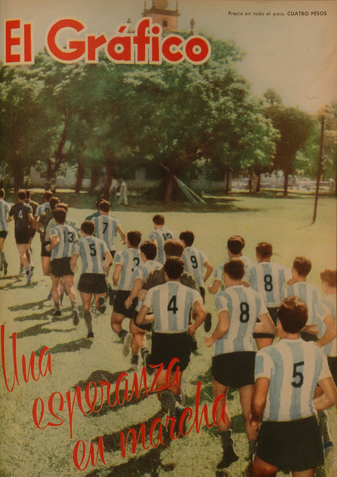 El Grafico del 05 de Marzo de 1959. Edicion 2060